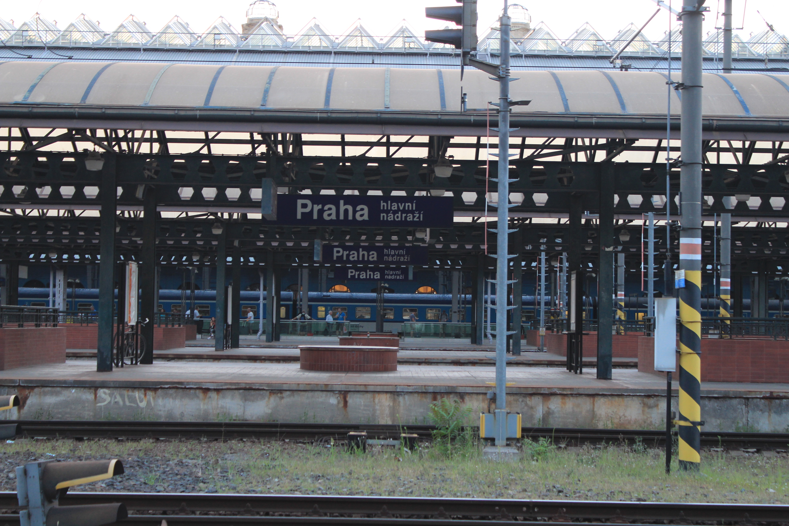 Praha hlavní nádraží budova terminálu autovlaků